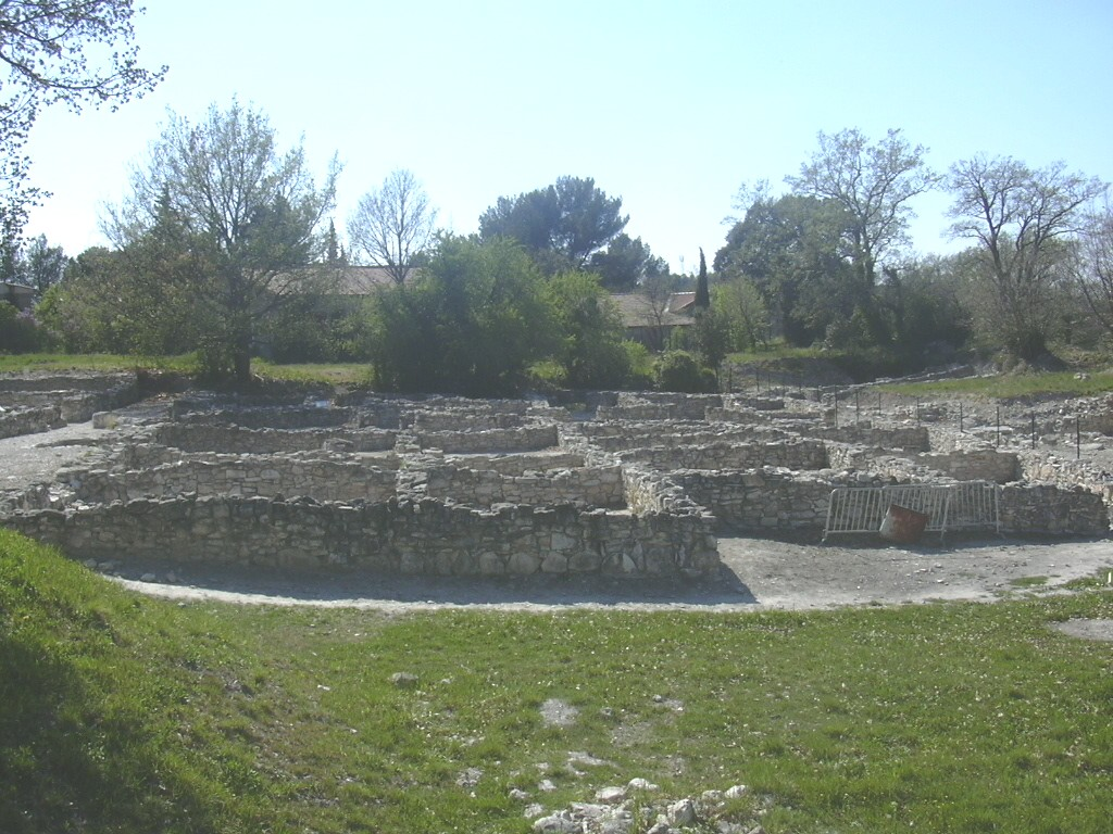 Vue des ruines de l'Oppidum d'Entremont, Aix-en-Provence, France